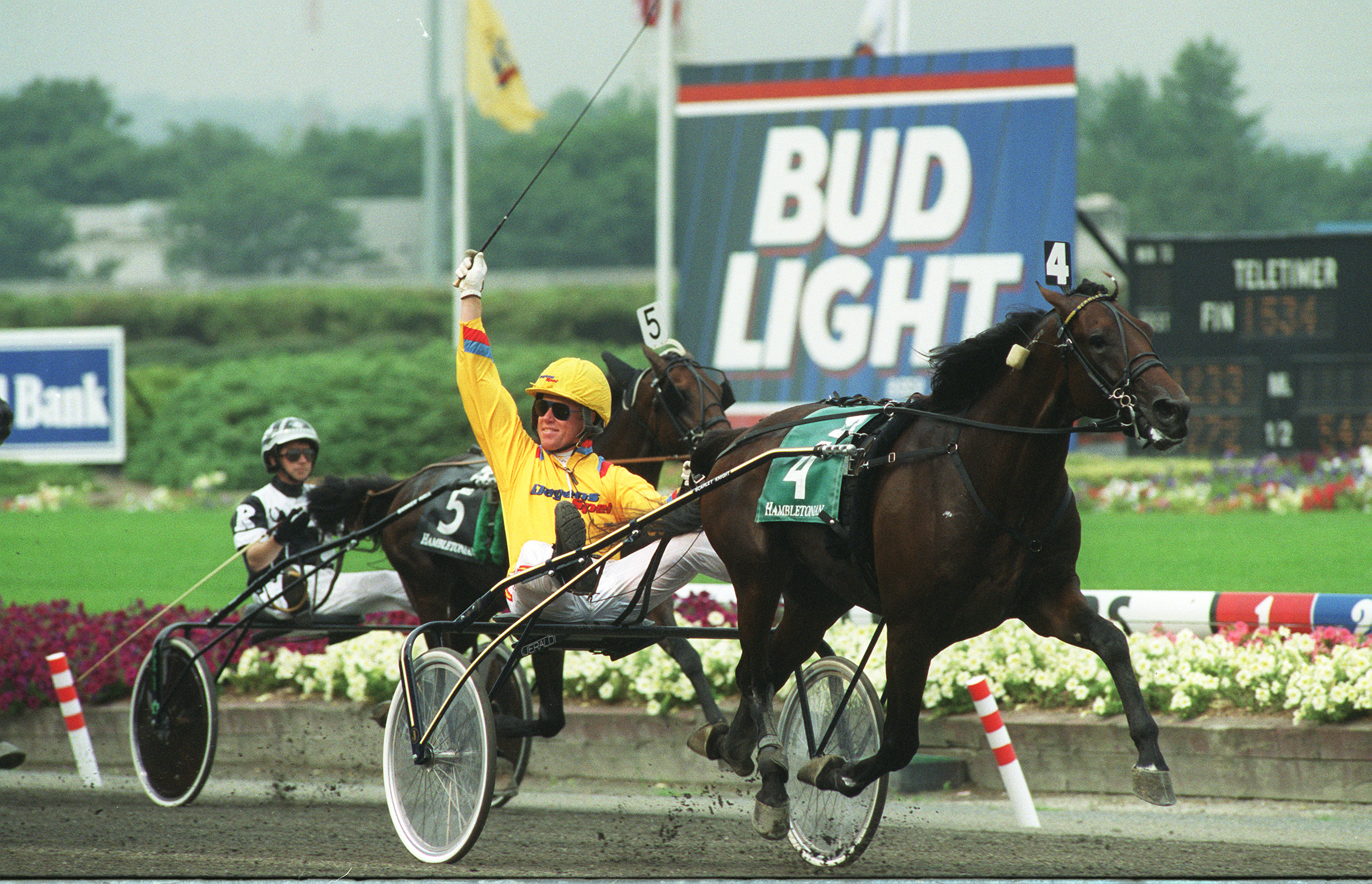 Scarlet Knight och kusken Stefan Melander vinner Hambletonian Stakes 2001.